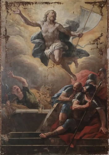 Resurrezione di Cristo - Paolo De Matteis